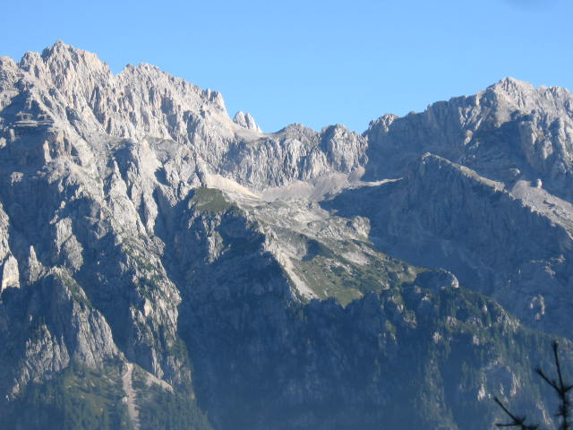 Martuljek-Gruppe mit Dovški križ (Gipfel rechts, 2.542 m) in den Julischen Alpen, Slowenien.